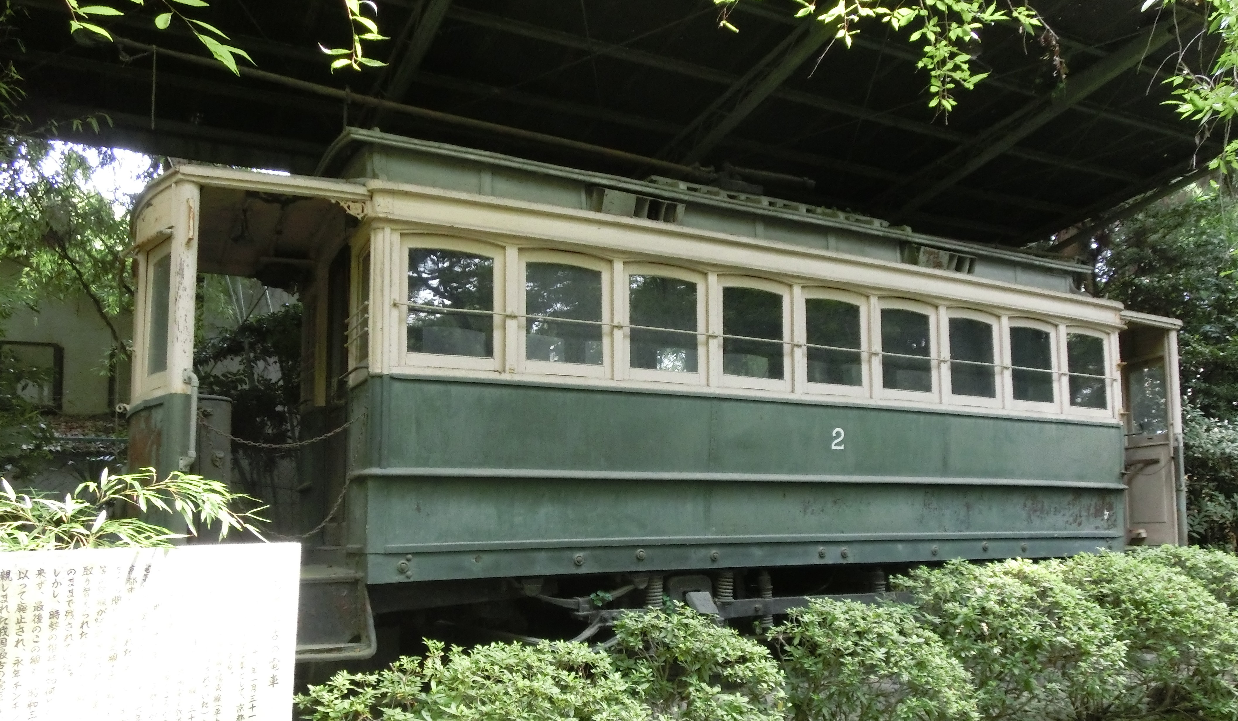 日本初の電車（平安神宮神苑）